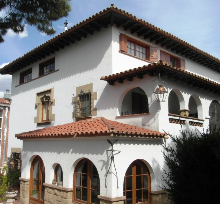 Habitatge unifamiliar aïllat